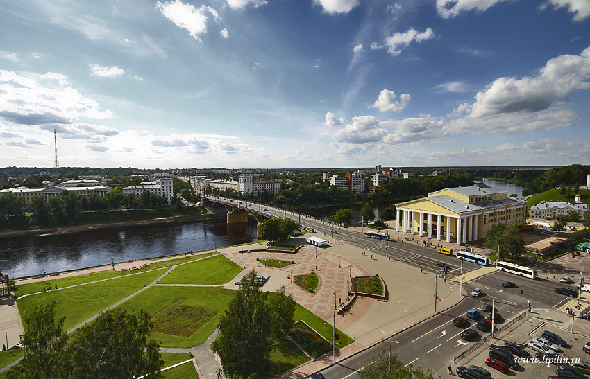 Віцебск. Плошча Тысячагоддзя Віцебска